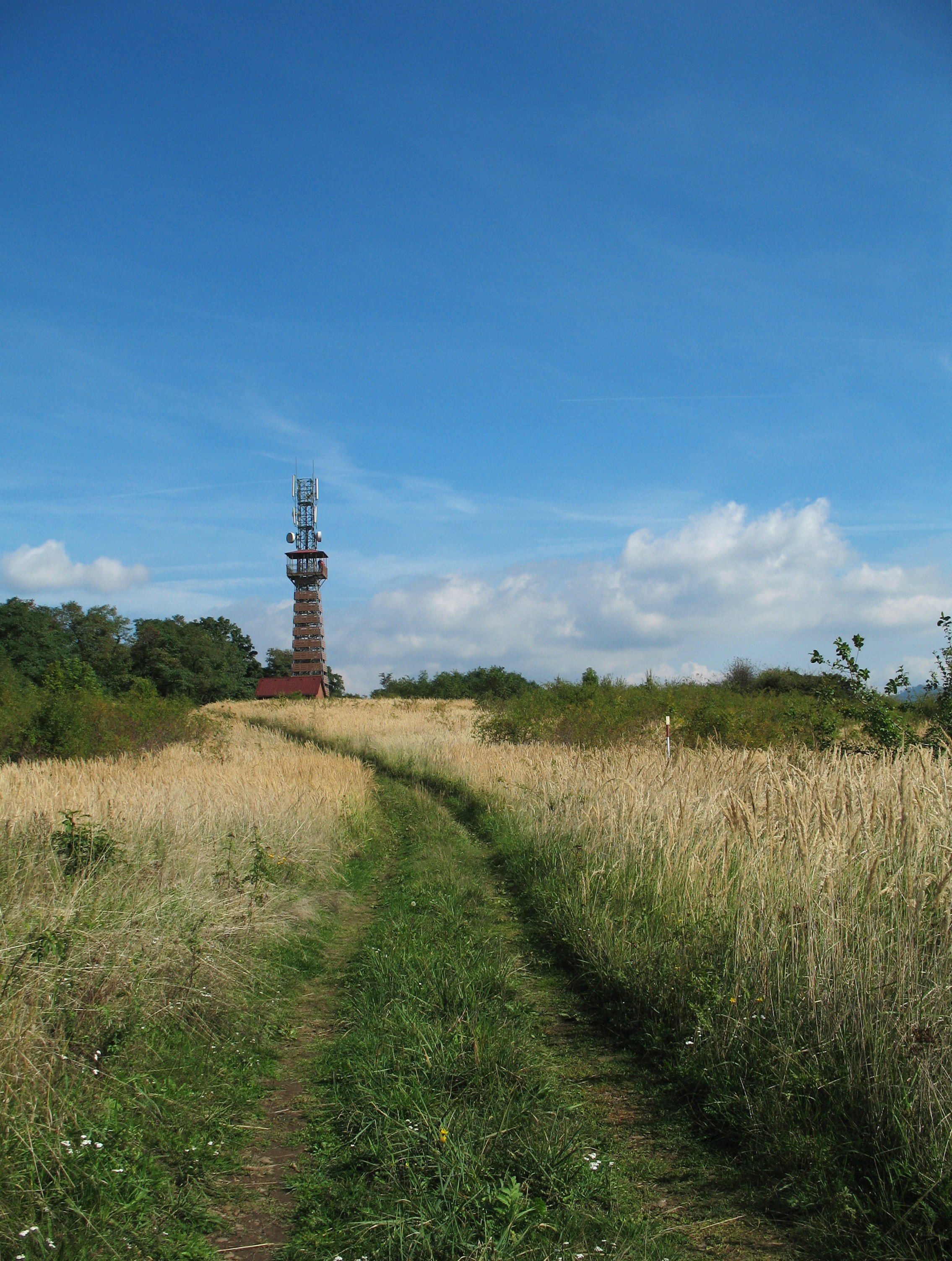 Cesta k rozhledně